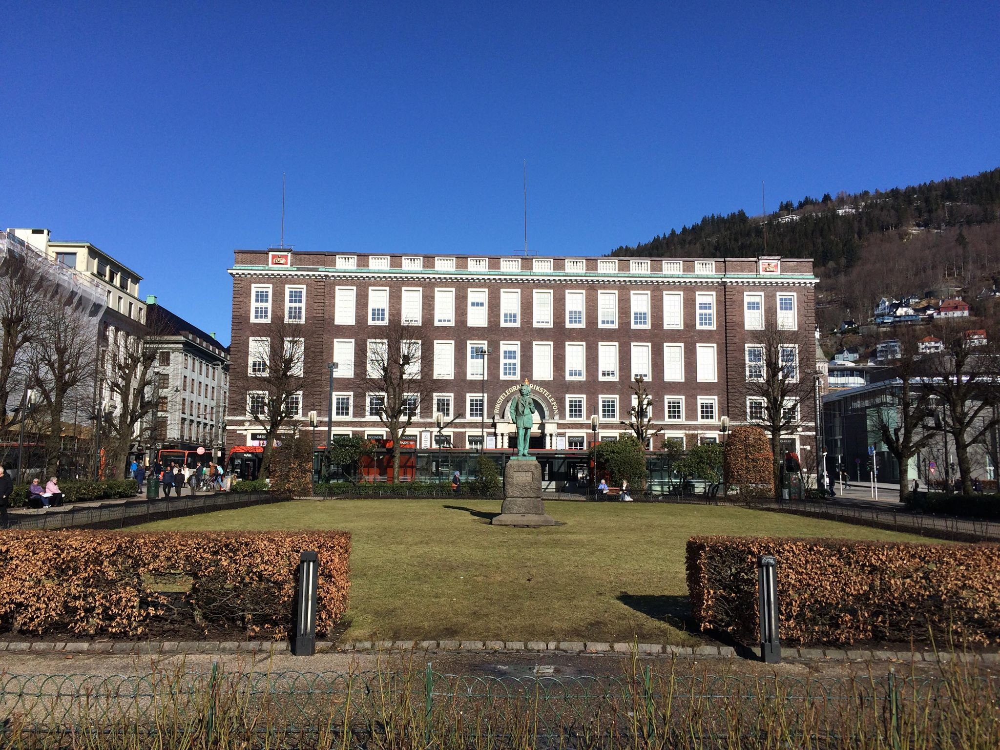 Monobank sine kontorer er lokalisert i Telegrafen i Bergen.